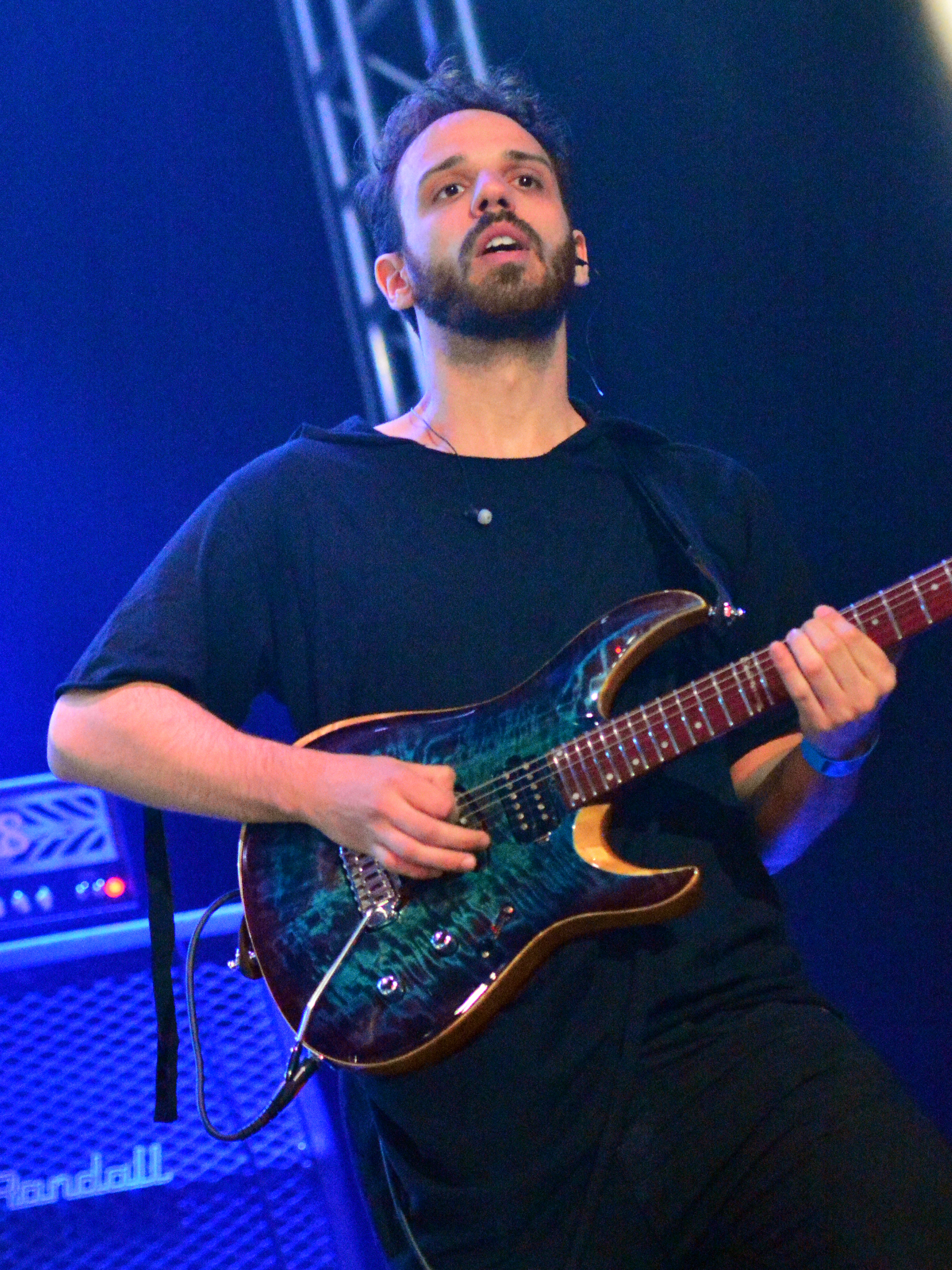 Ancient Bards beim Wacken Open Air 2015